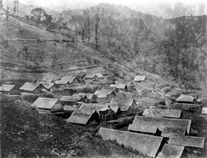 Negatief. Bovenaanzicht op het dorp Ledok, Oost-Java